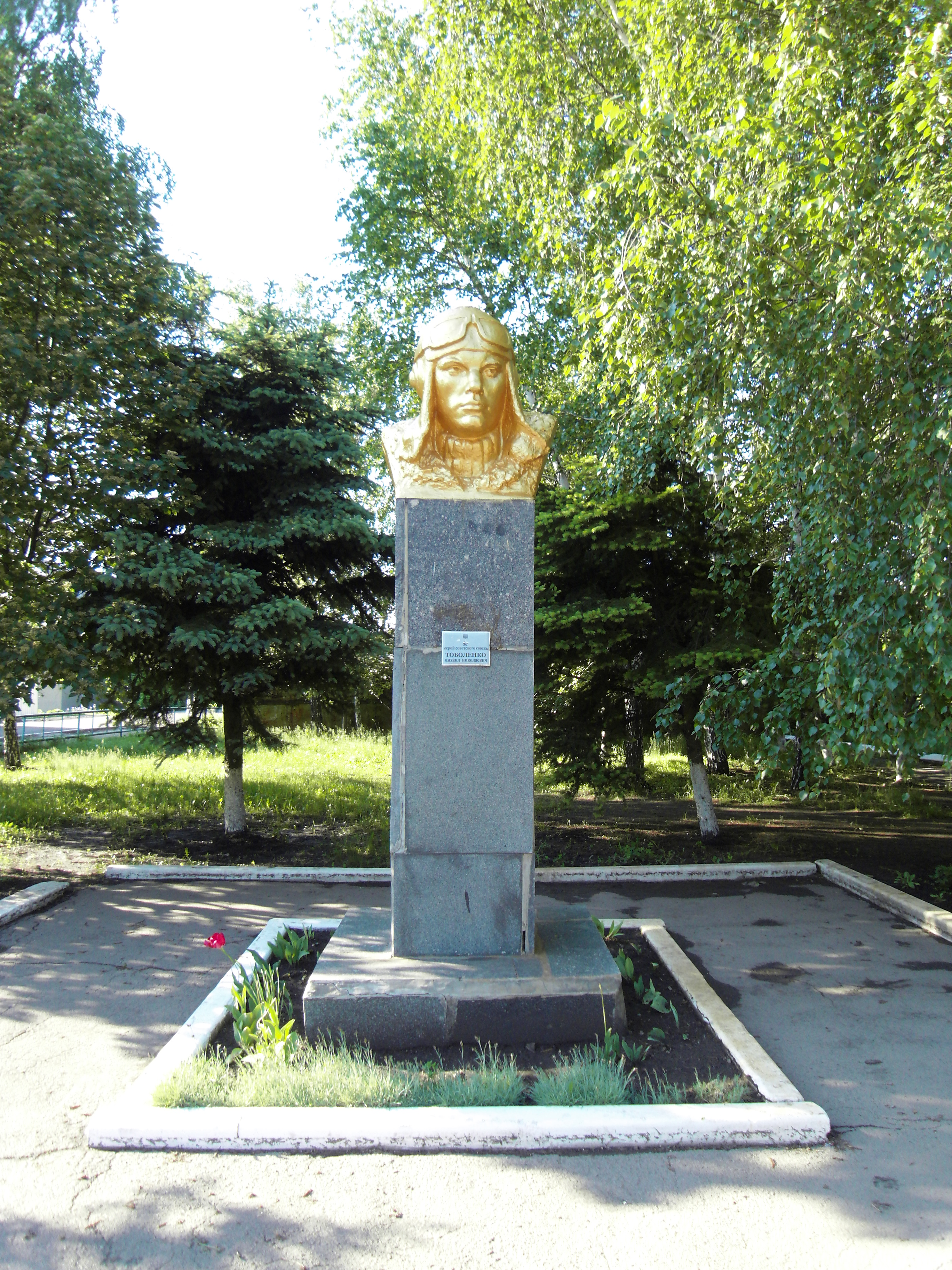 Пам'ятник М. М. Тоболенку, Герою Радянського Союзу, Дзержинськ